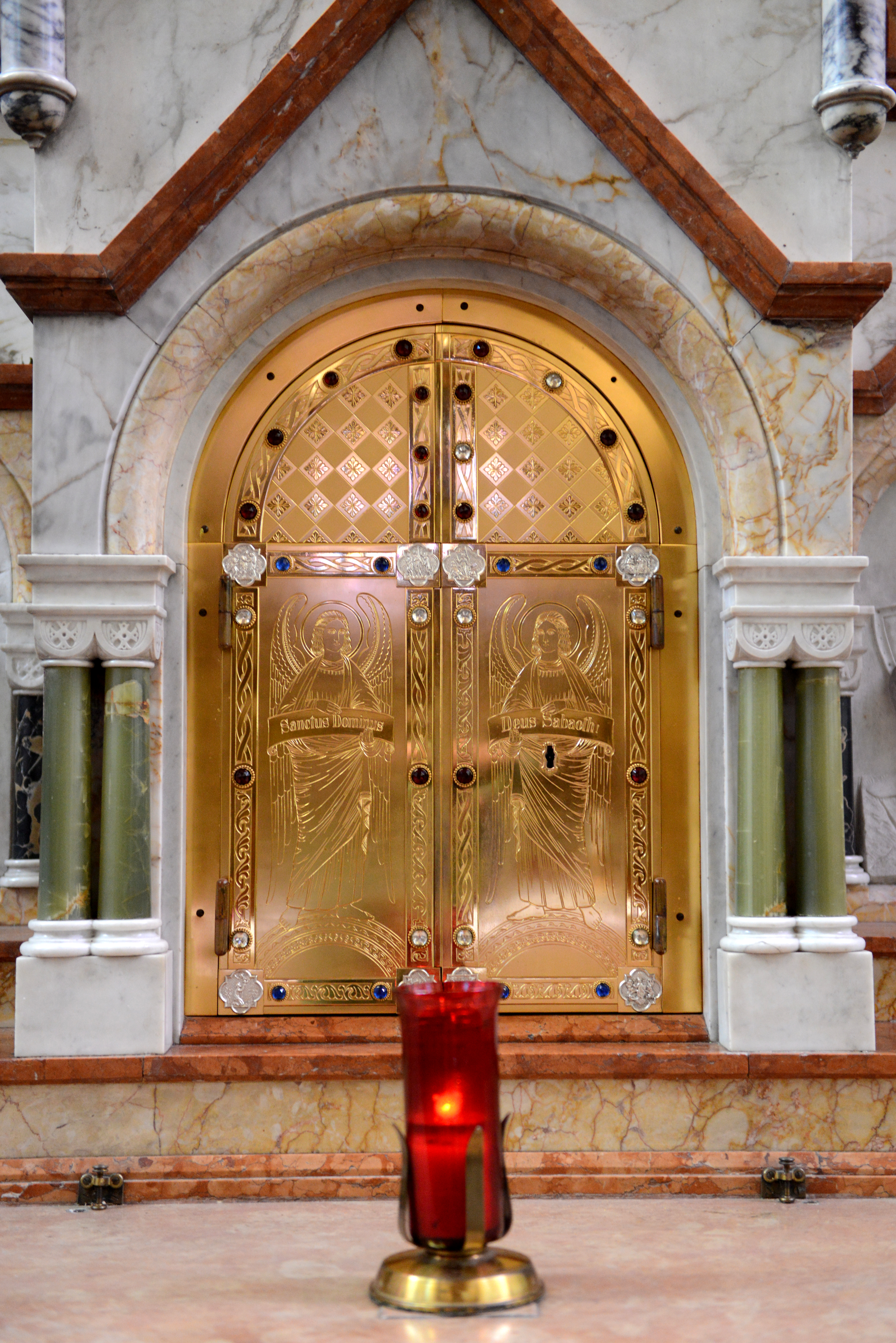 Den Tabernakel an d'Éiwegt Liicht um Héichaltor an der Beetebuerger Kierch.